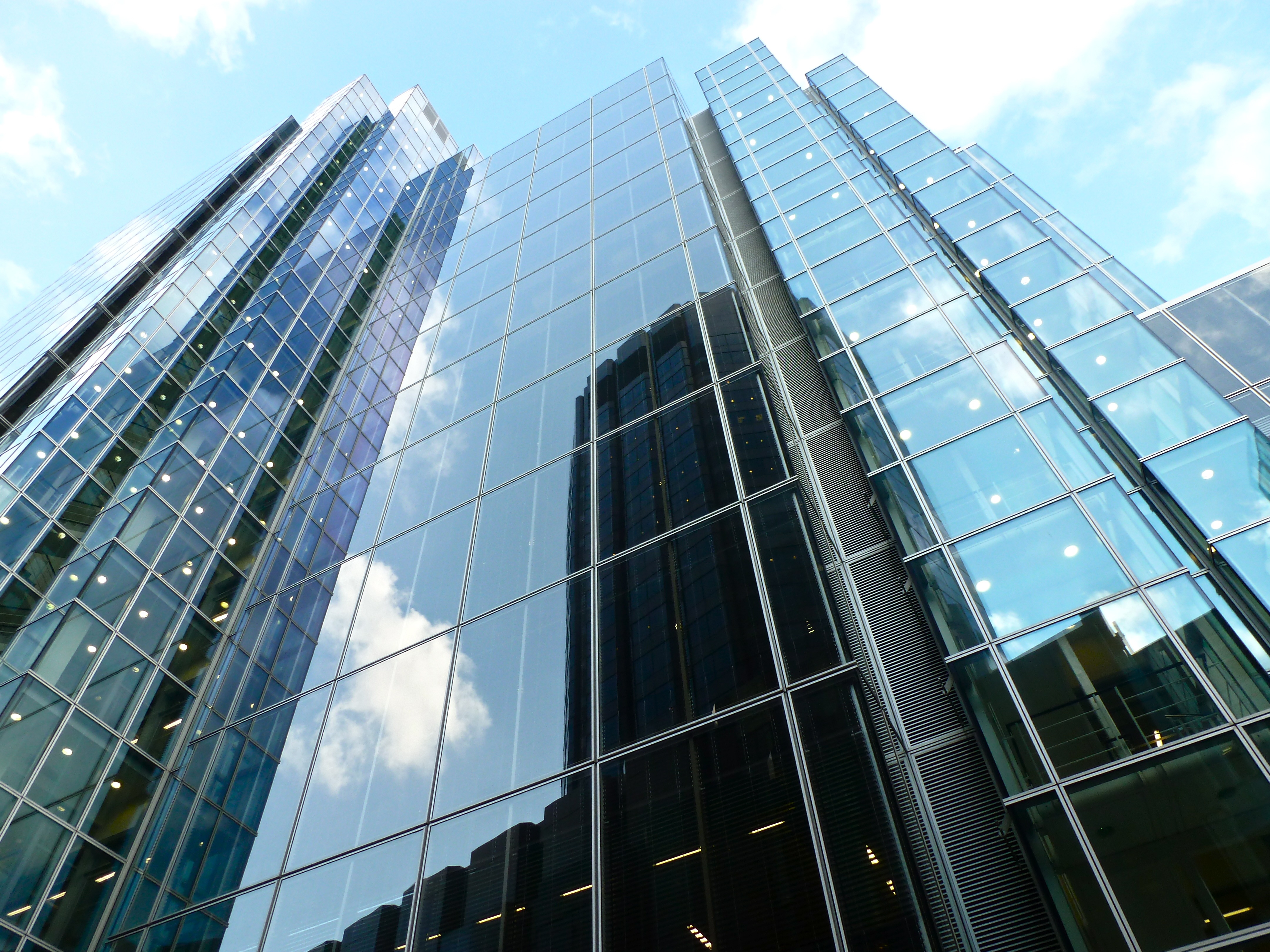 Drapers' Gardens